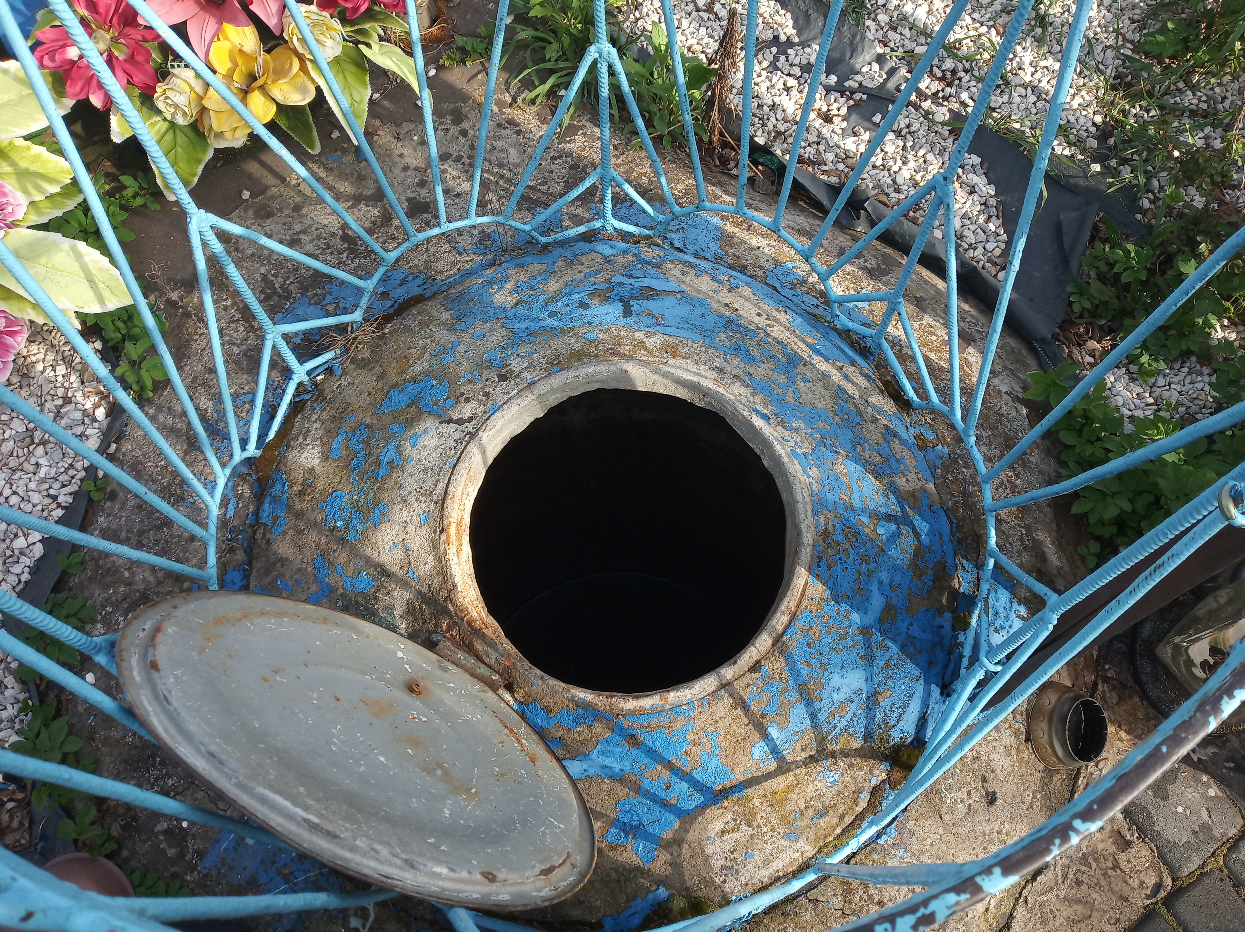 Studzienka ,, cudowne źródełko""